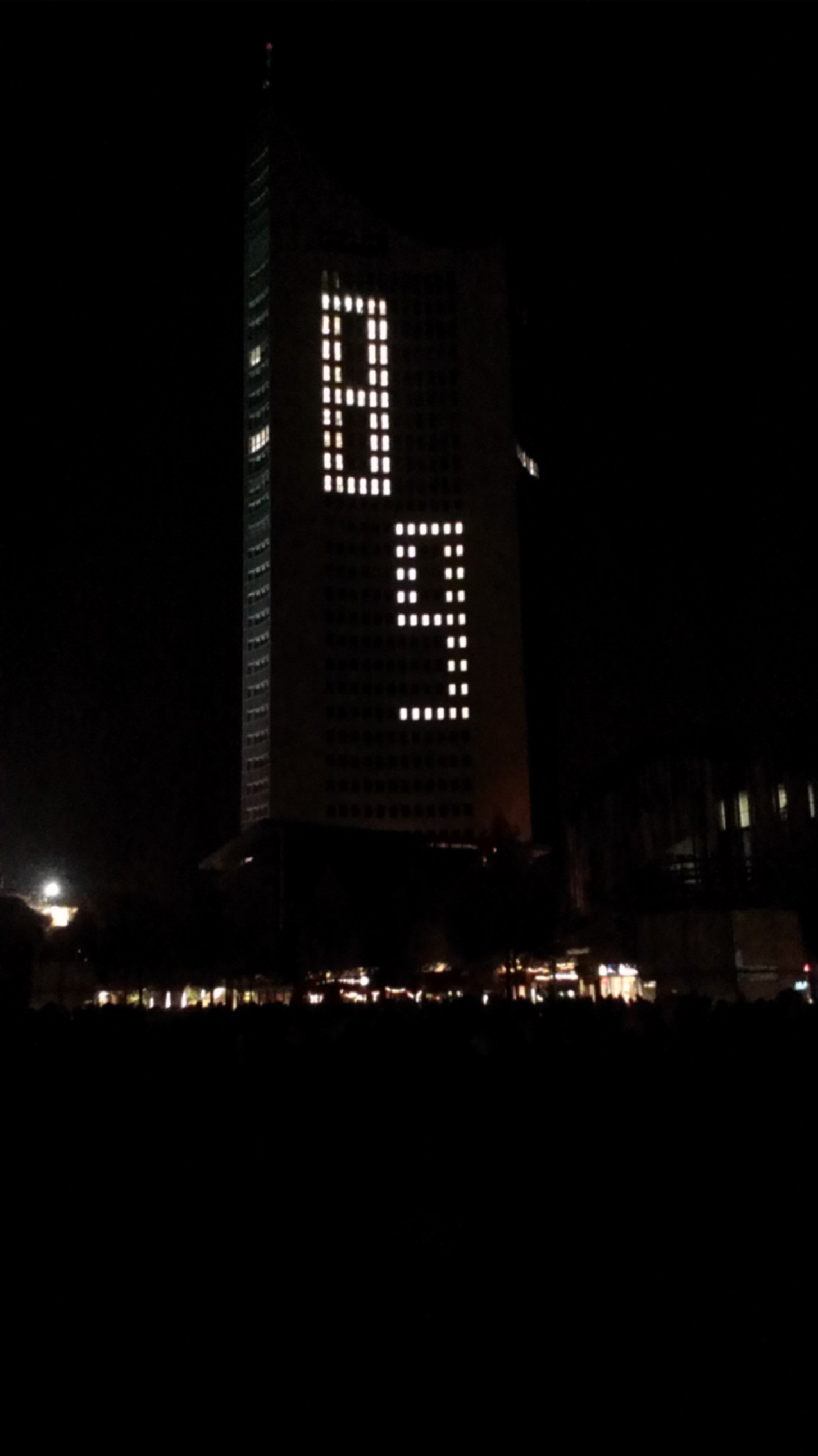 Lichtfest Leipzig – Jahreszahl am "Uniriesen".